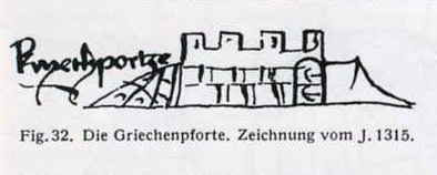 Griechenpforte Köln, in einer Zeichnung von 1315